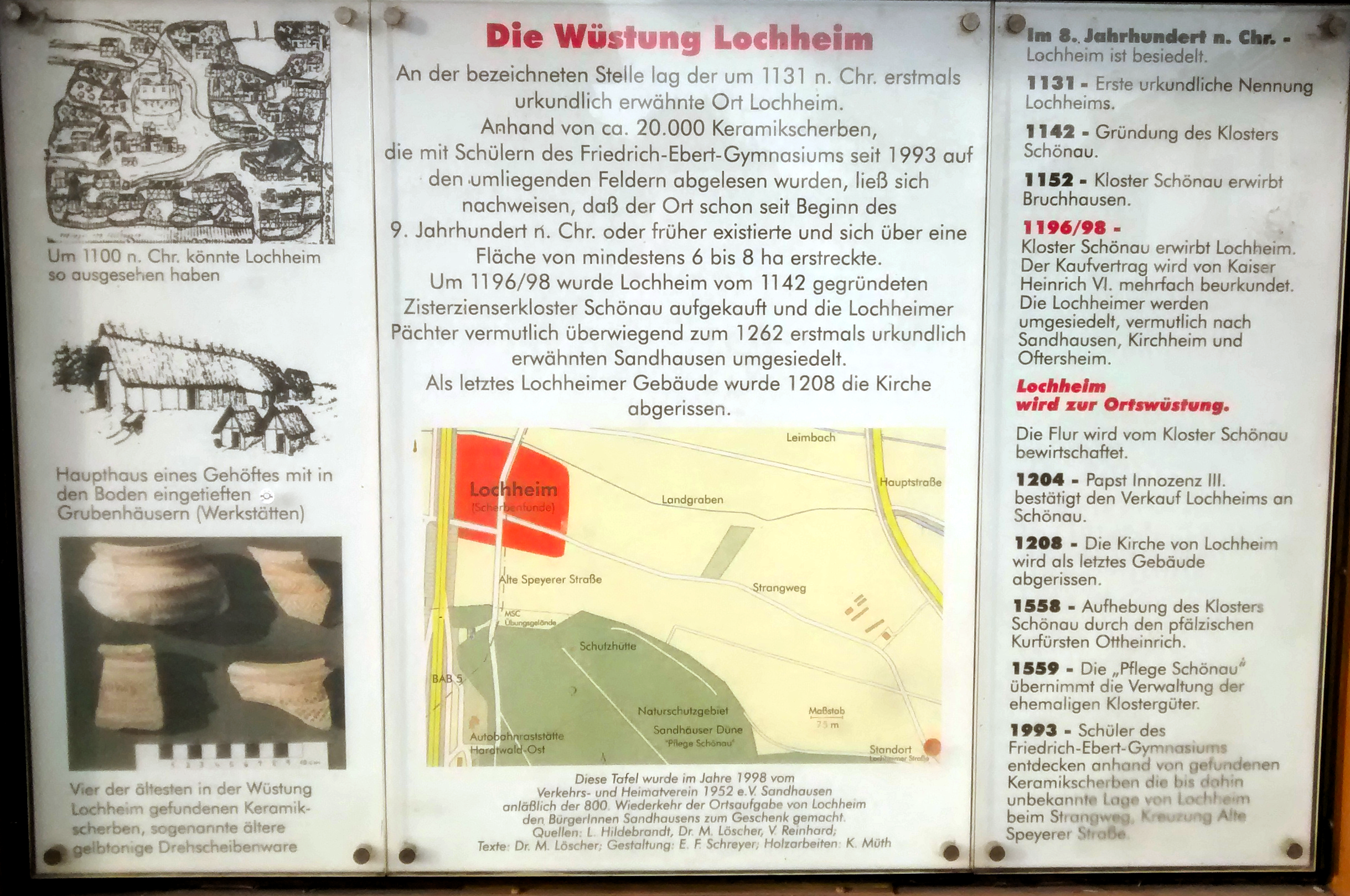 Diese Tafel wude im Jahre 1998 vom Verkehrs- und Heimatverein 1952 e.V. Sandhausen anläßlich der 800. Wiederkehr der Ortsaufgabe von Lochheim den BürgerInnen Sandhausens zum Geschenk gemacht. Sie steht in der Lochheimer Straße in Sandhausen am Eingang des Strangwegs.